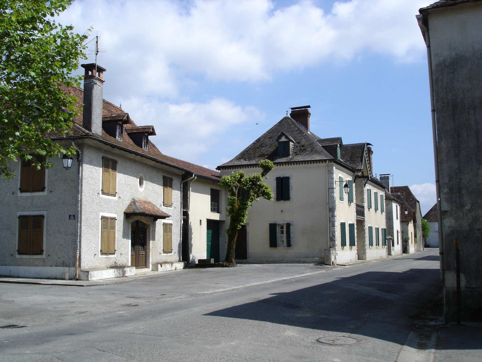 Le village de Méritein -- Photo amateur prise par moi-même